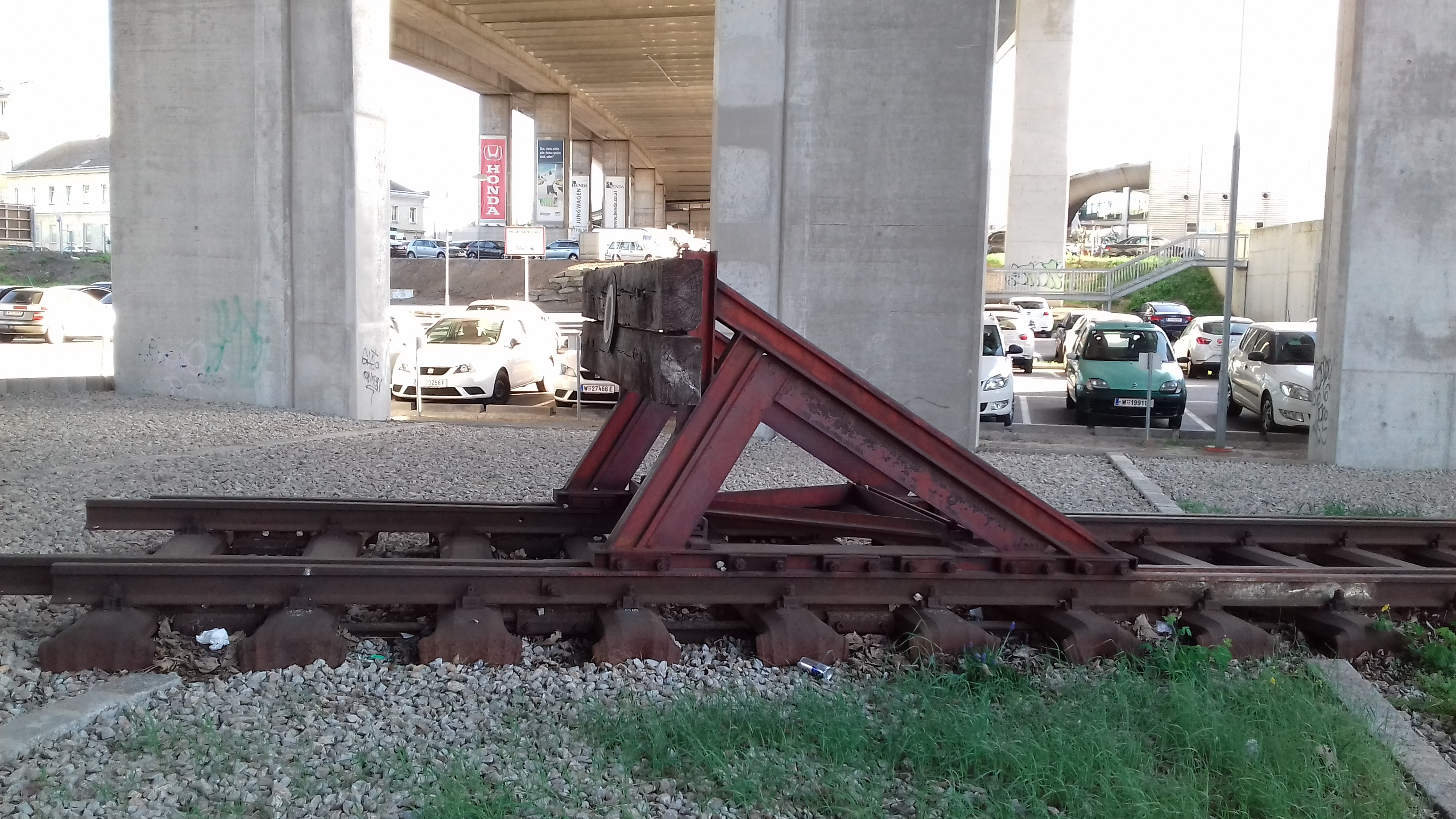 Ein Gleisrest der Schlachthausbahn unterhalb der südosttangente